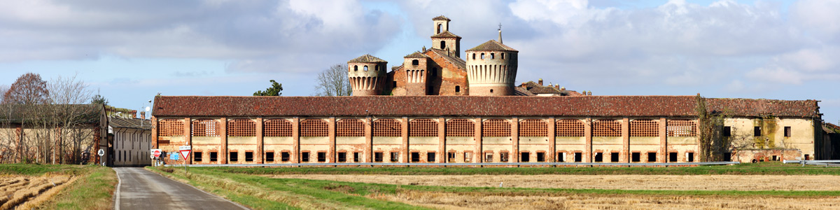 Panorama di Valeggio (PV) provenendo da Scaldasole, con il cascinale che racchiude il castello